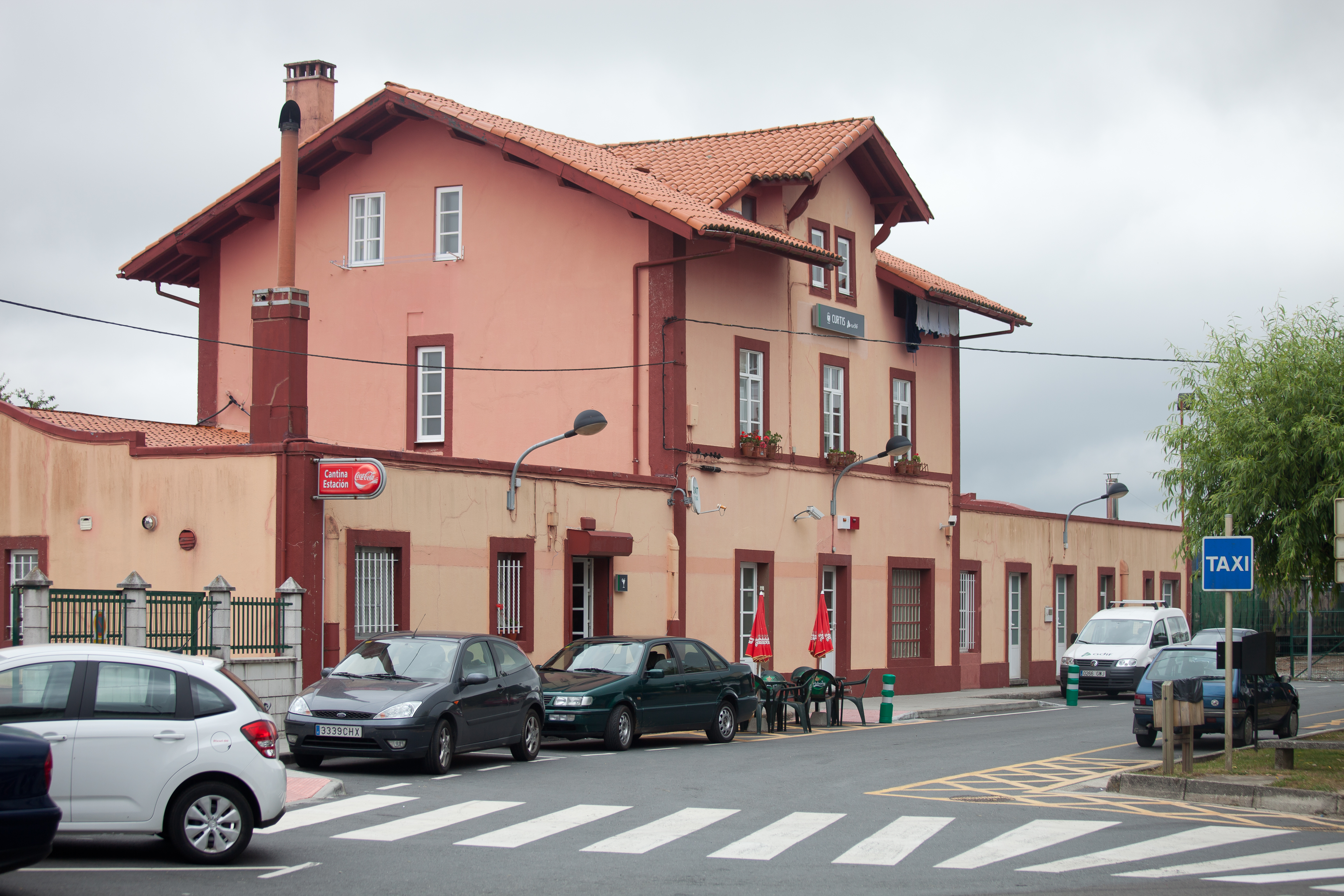 Estación de Curtis, Rúa, Curtis, Galiza.